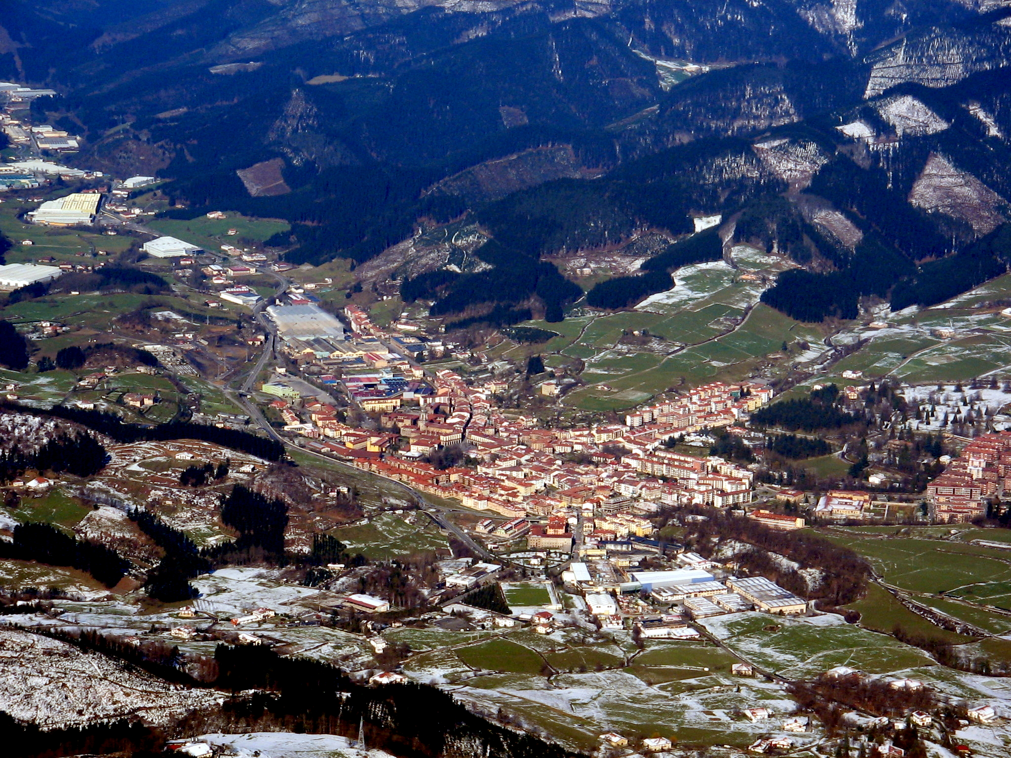 Oñati Aloña menditik